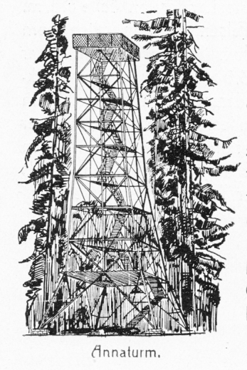 Zeichnung des Annaturms im Deister, ca. 1910